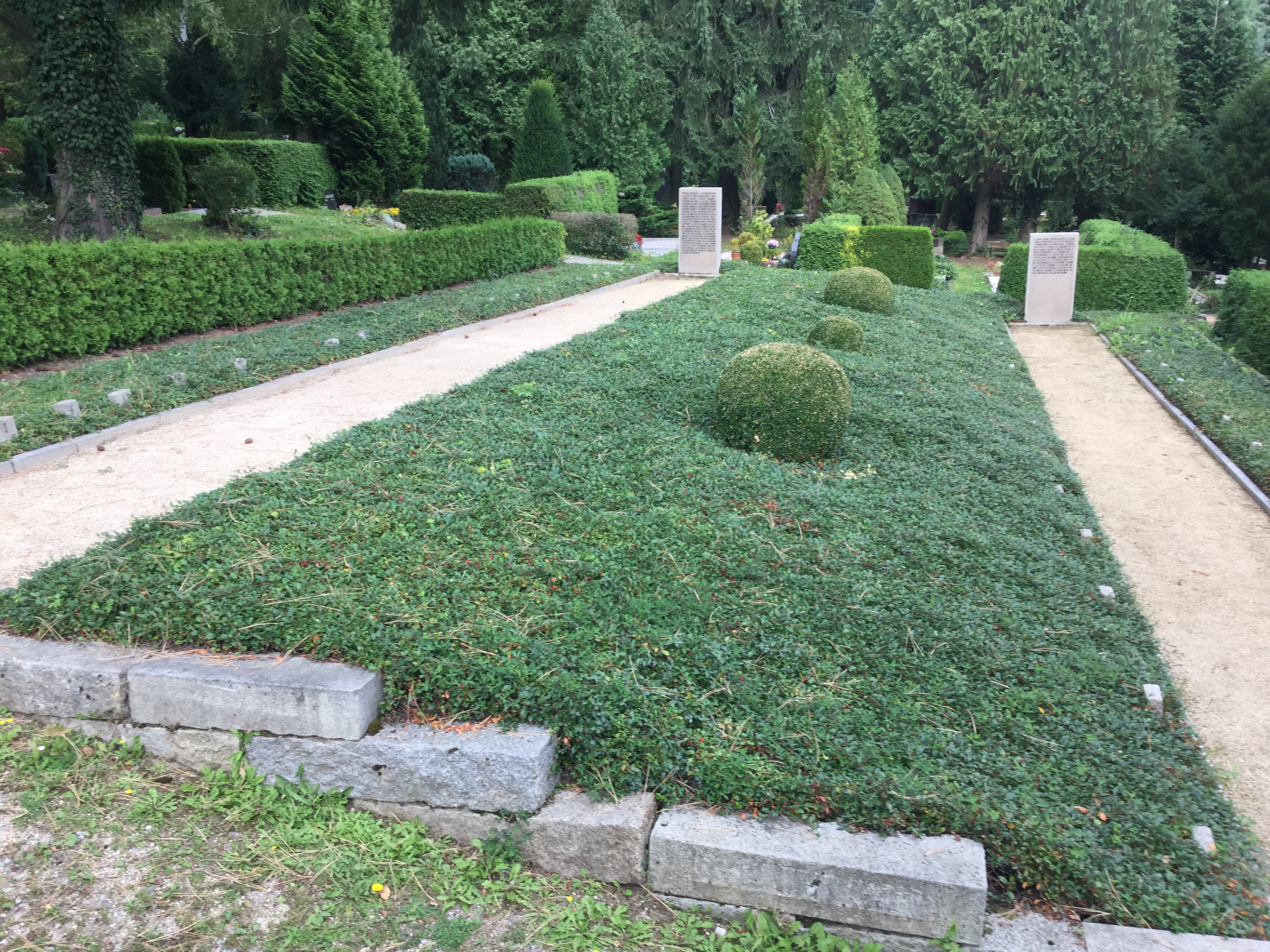 Gedenkstätte für Tote des Weltkrieg II Zentralfriedhof Wernigerode